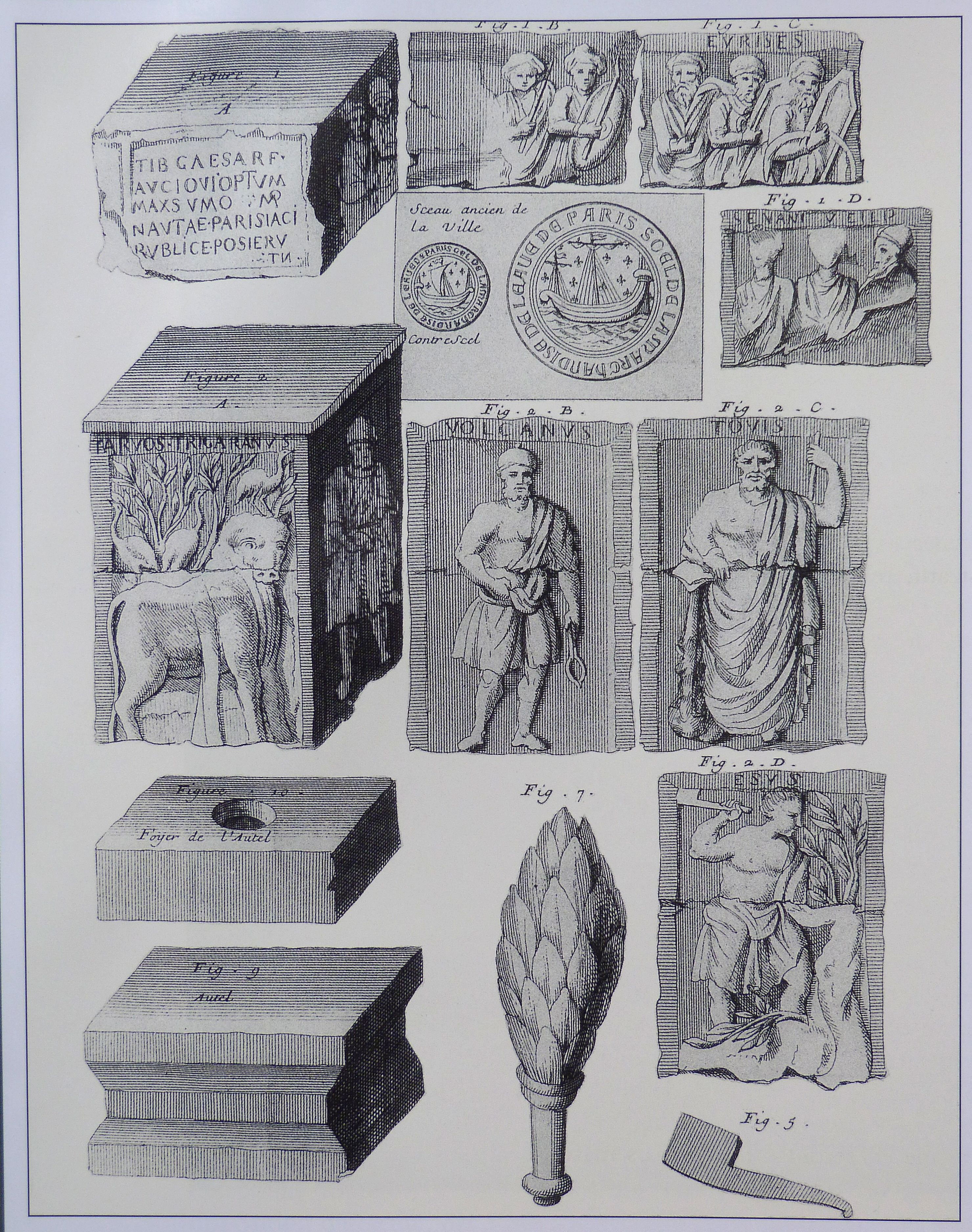 Éléments découverts au cours de fouilles en 1711 constituant Le Pilier des Nautes, vestiges d'un temple pré-chrétien (Ier siècle ap.JC) sur l'île de la Cité à l'emplacement du chœur de ND de Paris. Gravure extraite de L'Histoire de Paris tome 1, Michel Félibien (1666 ? - 1719).